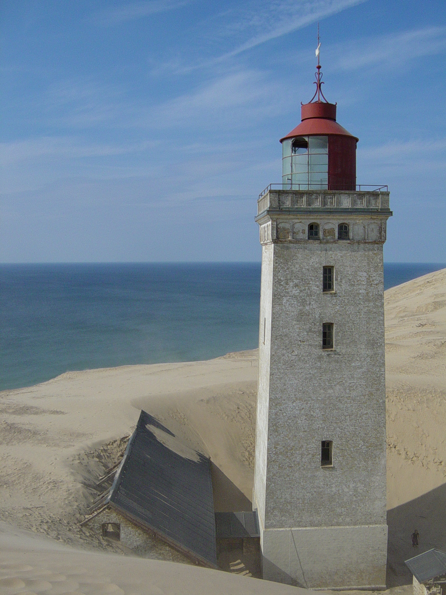 Rubjerg Knude fyr i 2004